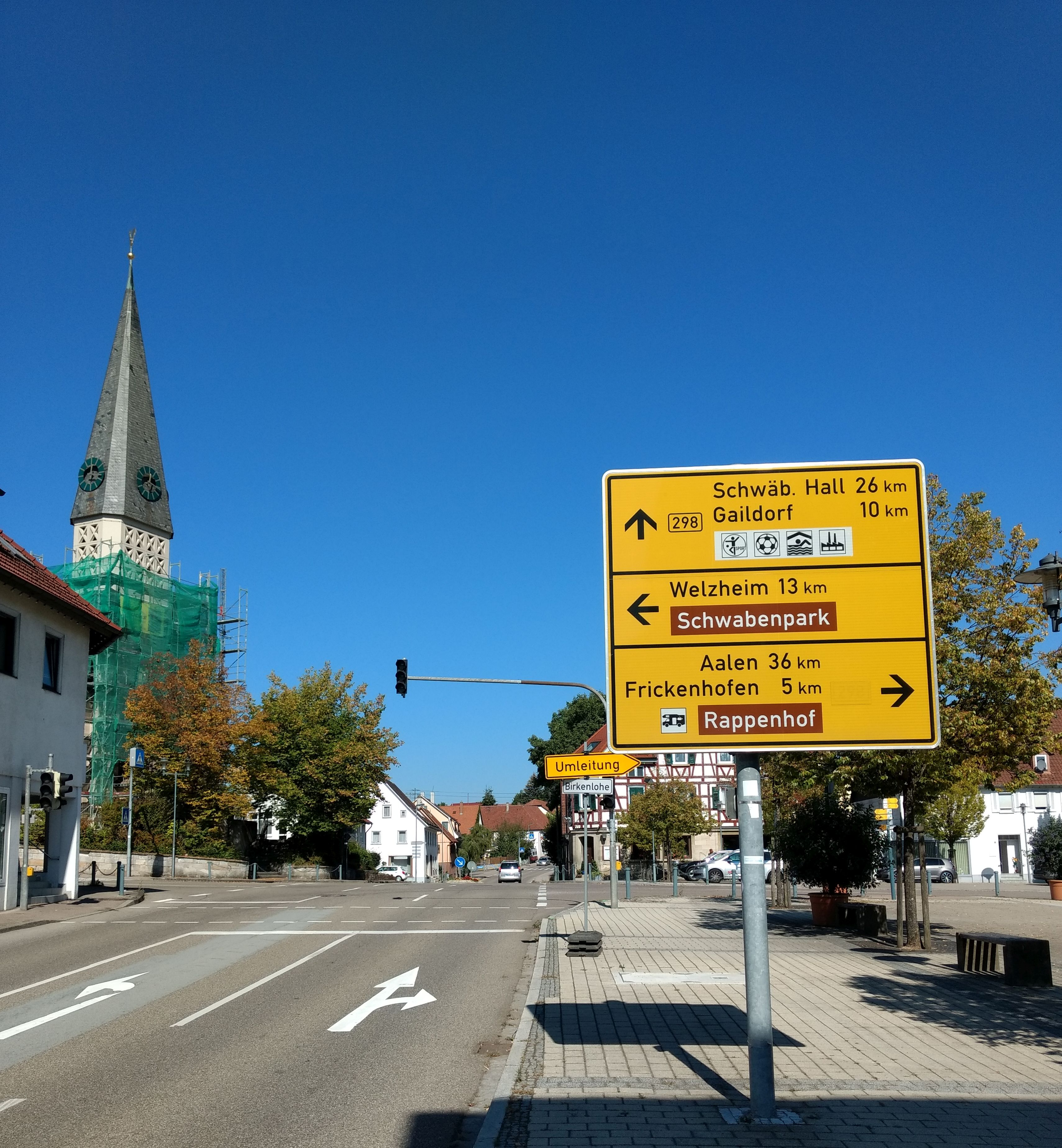 Gschwend